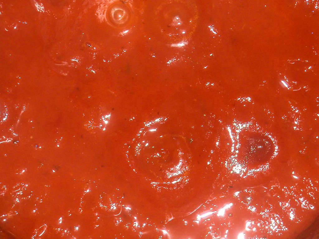 Tomatsauce